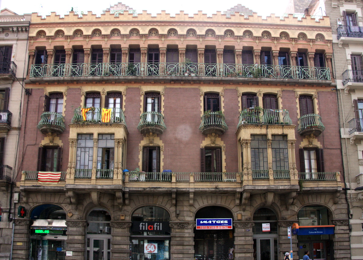 Casa de Consol Grassot al c/ de Sants, 145-147 (Barcelona, Catalunya), obra de 1902 de Modest Feu i Estrada (1870-1933)